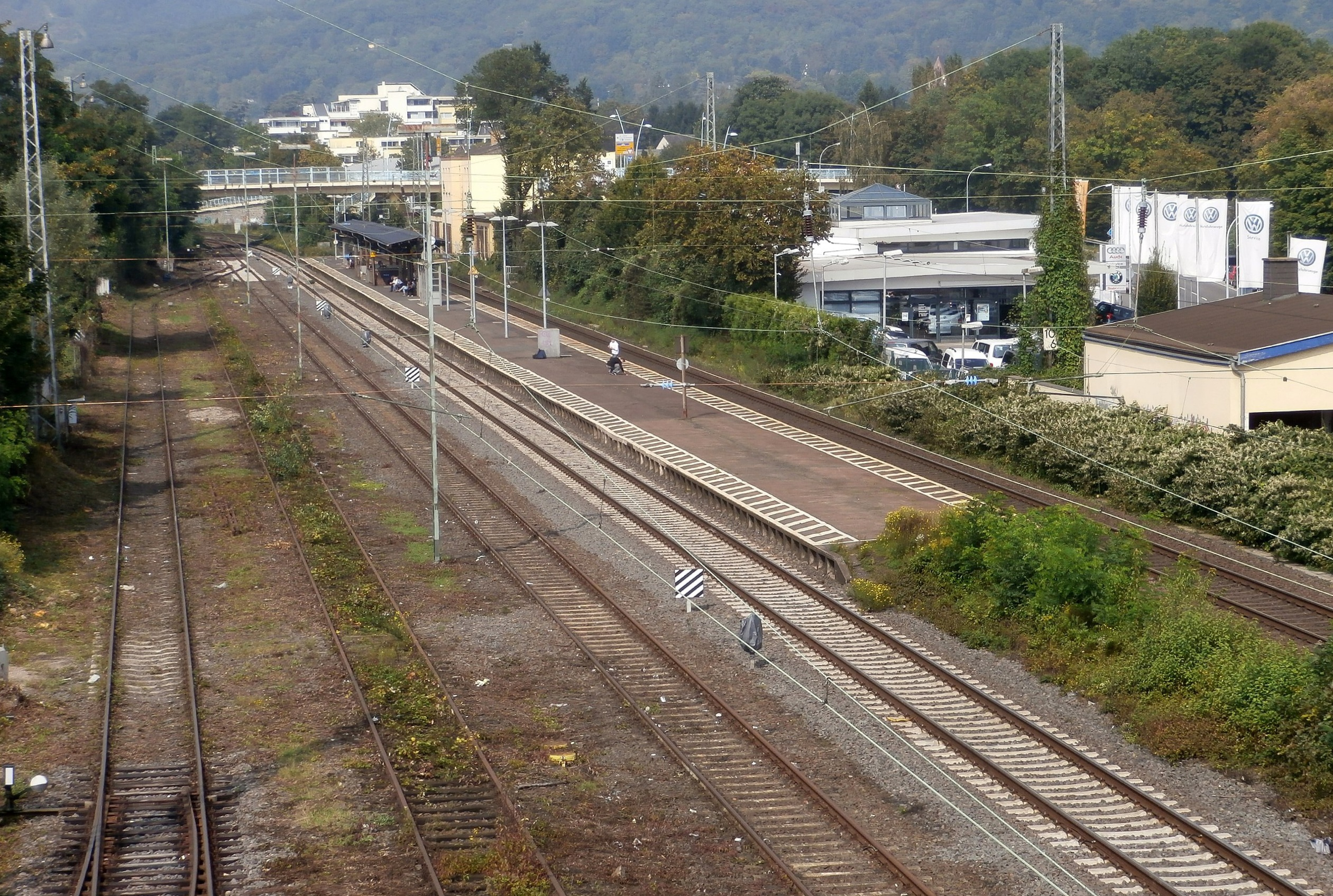 Bahnhof Bad Honnef (Rhein)